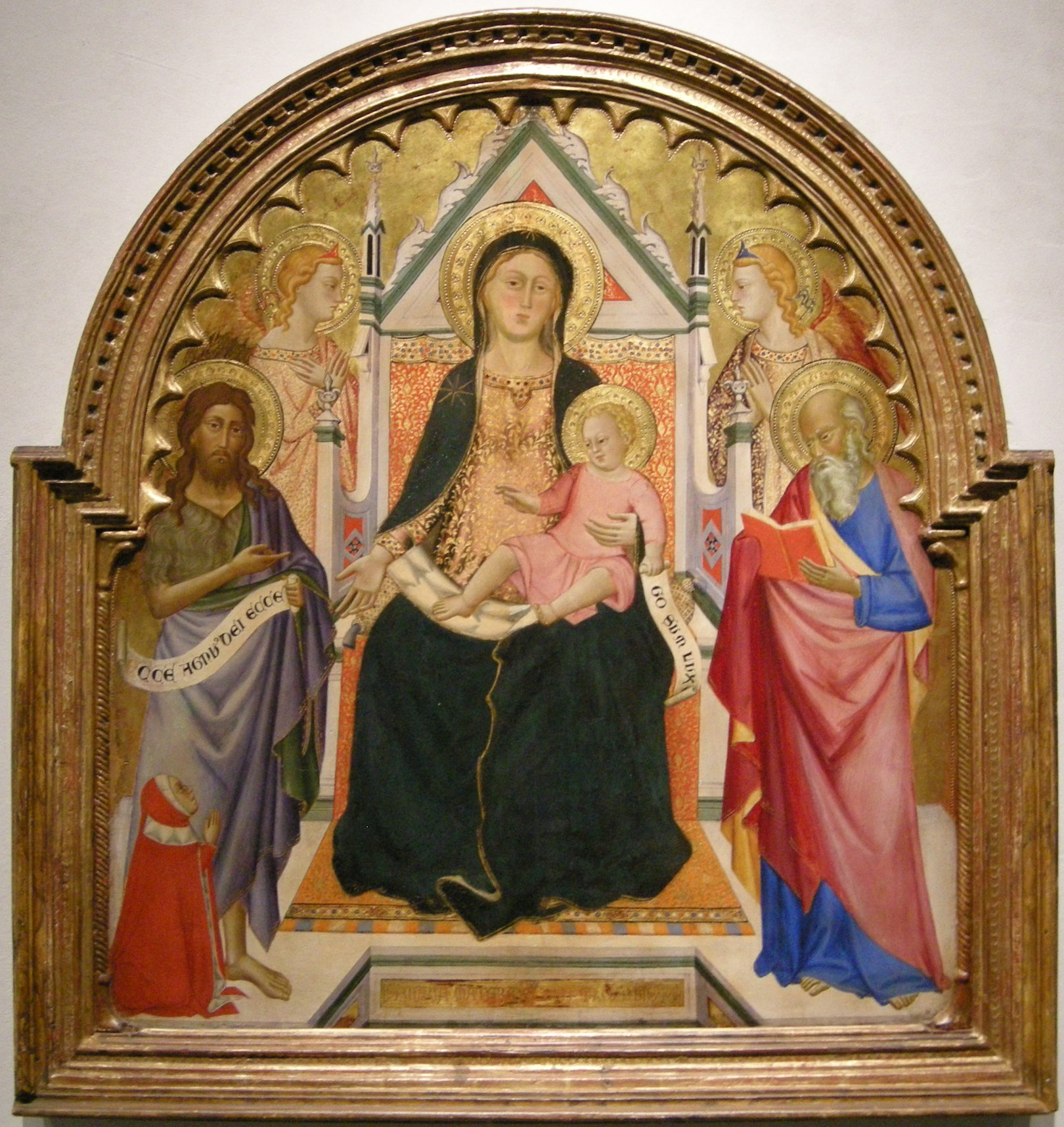 Silvestro de' gherarducci (attr.), madonna col bambino tra i santi giovanni battista e giovanni evangelista, 1375 ca.